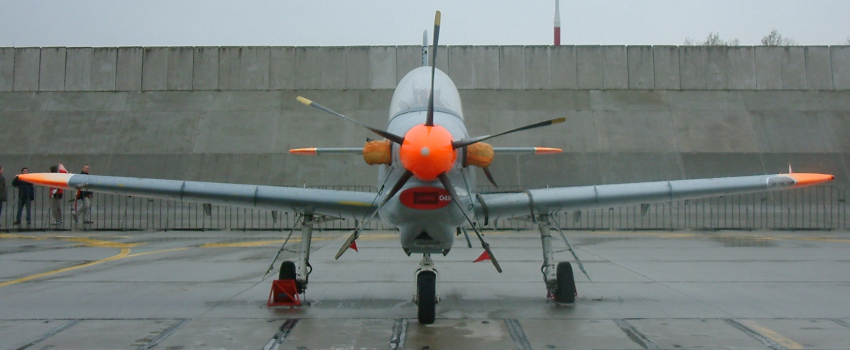 PZL-130TC-1 Orlik #049 of Polish Air Force, 31st. Air Base Poznań-Krzesiny